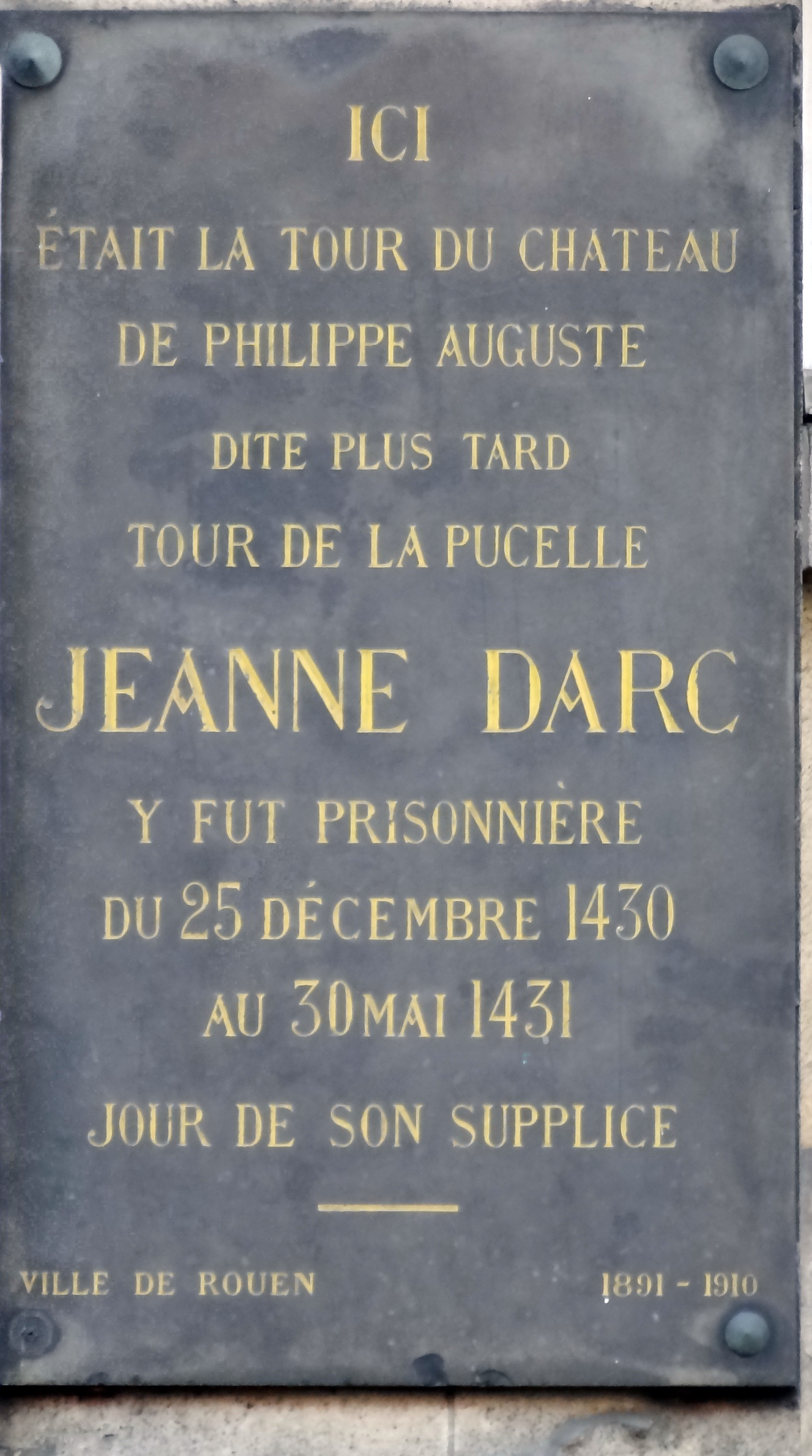 Plaque de marbre noir - Lieu d’emprisonnement de Jeanne d'Arc en 1431 - 102, rue Jeanne-d'Arc, Rouen (Haute-Normandie)